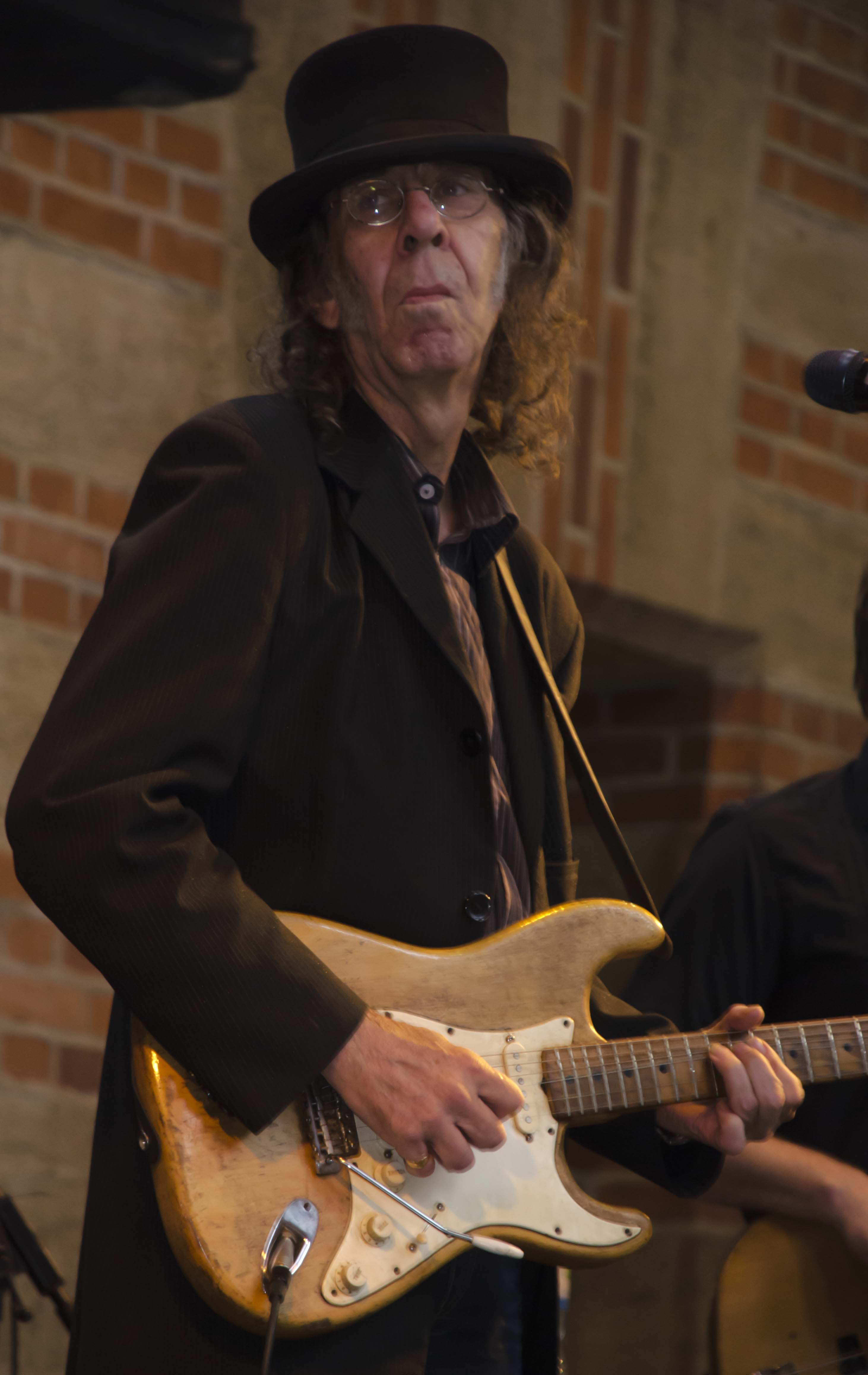 Nick Woodland. Rock im Bahnhof, Stuttgart, 20.7.2012